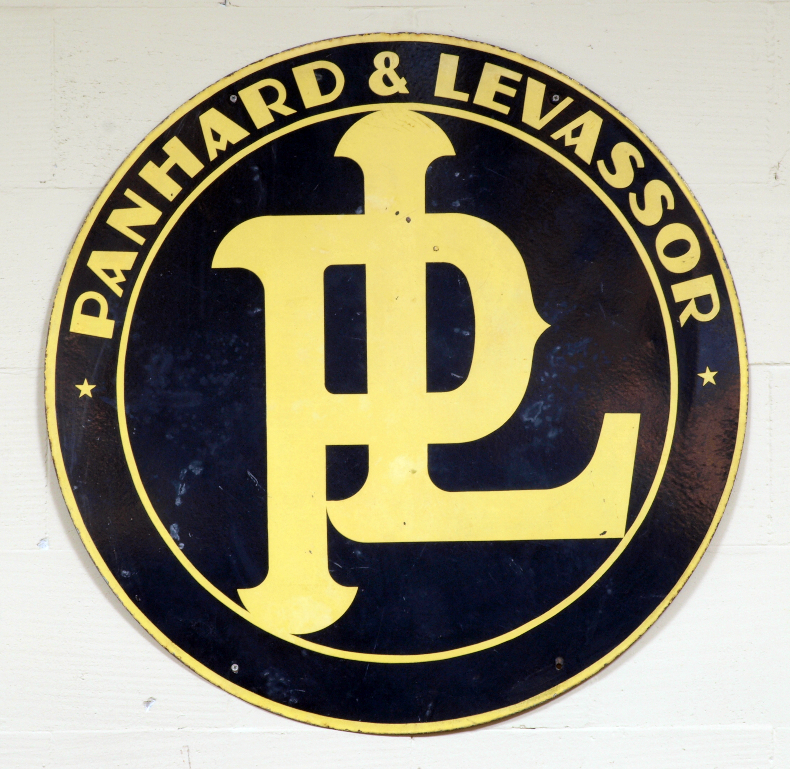 Den Hartogh Ford Museum.